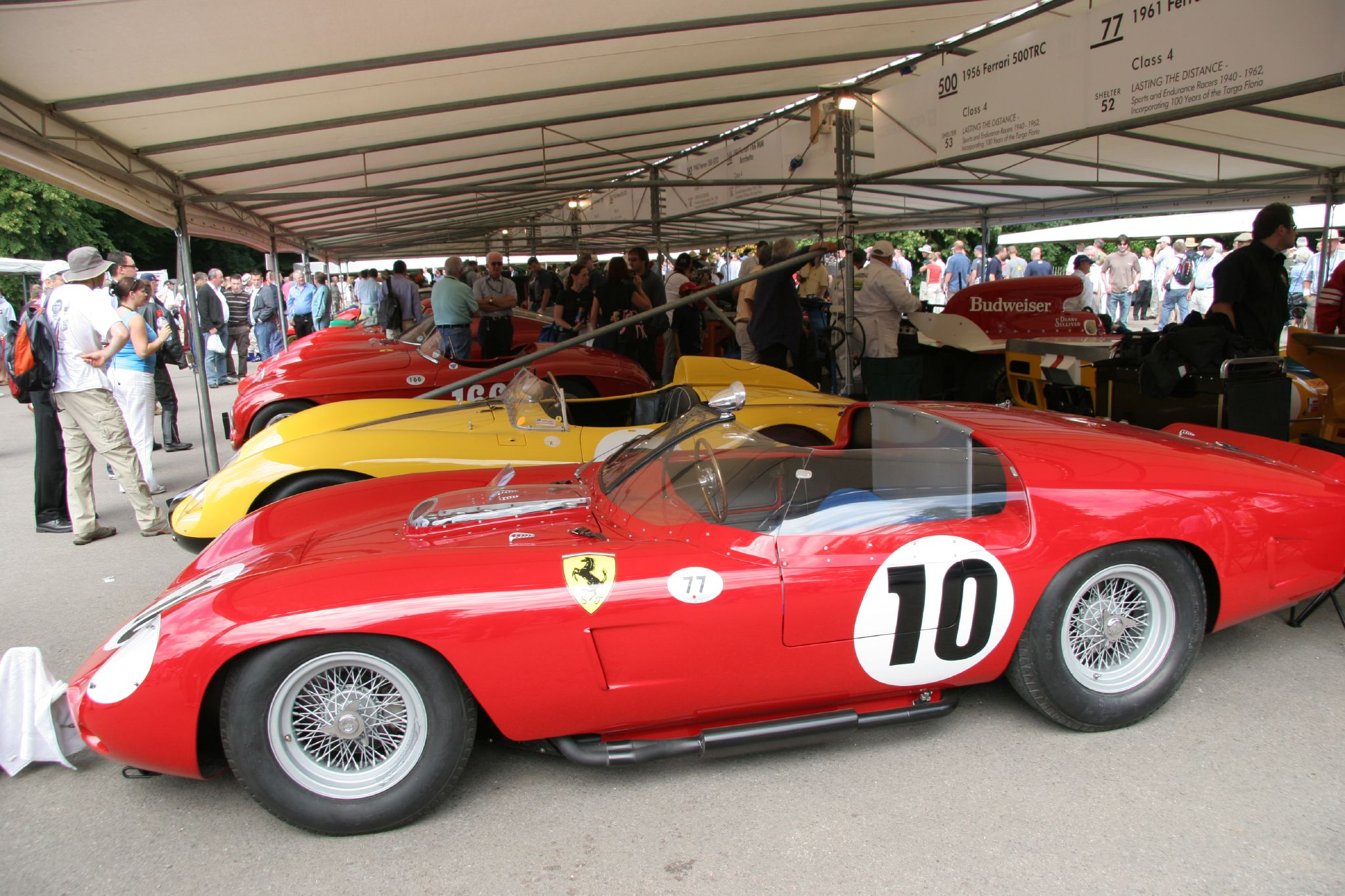 Ferrari TR61, O.Gendebien-P.Hill Winner Le Mans 1961